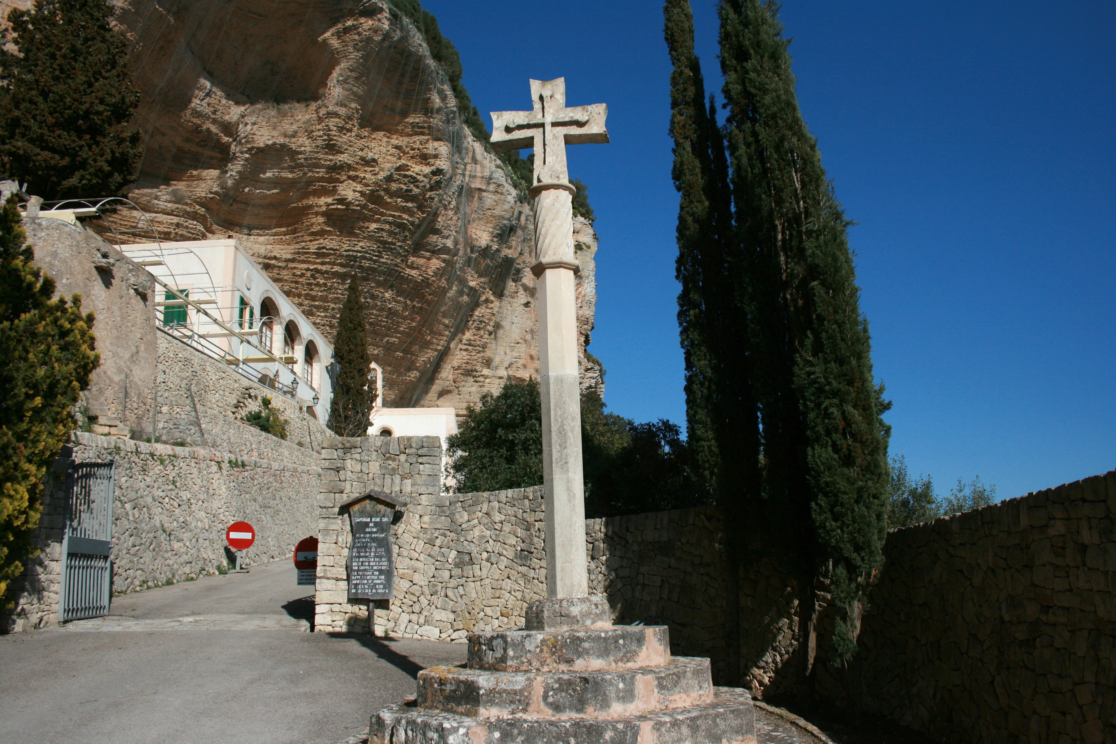 Santuari de Nostra Senyora de Gràcia, Puig de Randa in Algaida, Mallorca